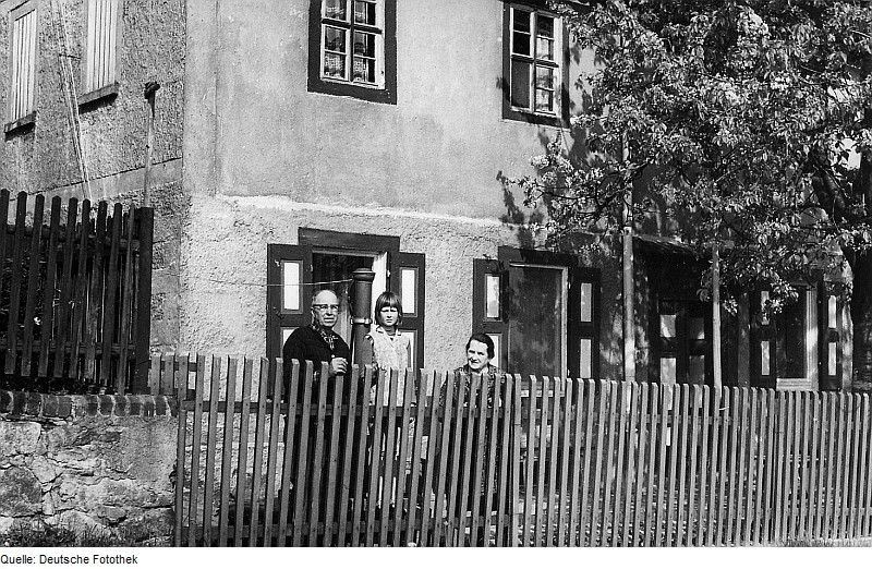 Original image description from the Deutsche Fotothek Wermsdorf-Liptitz-Mannewitz. Ehem. Windmühlenhaus?